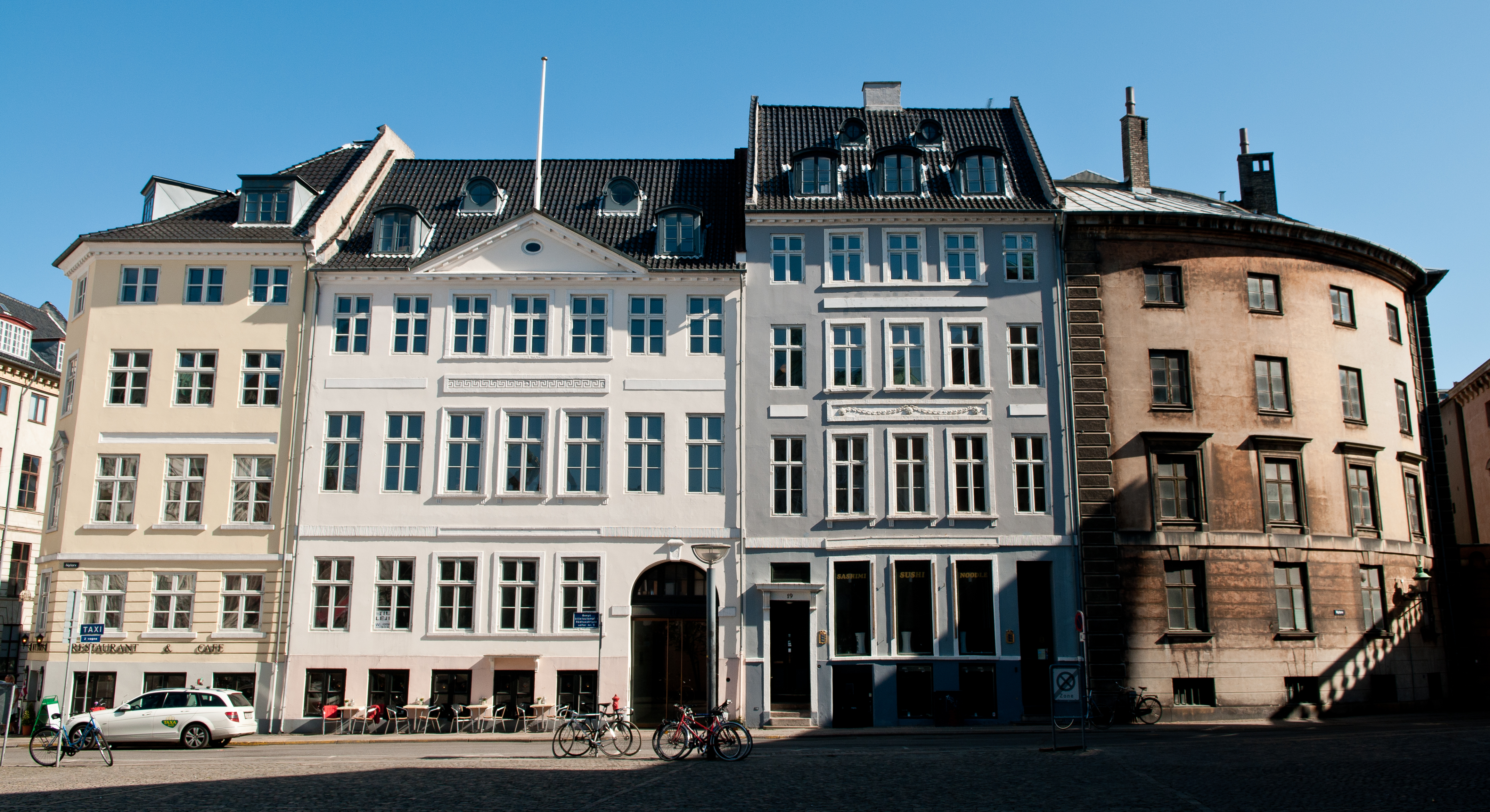 Nytorv 14-21 in Copenhagen, Denmark